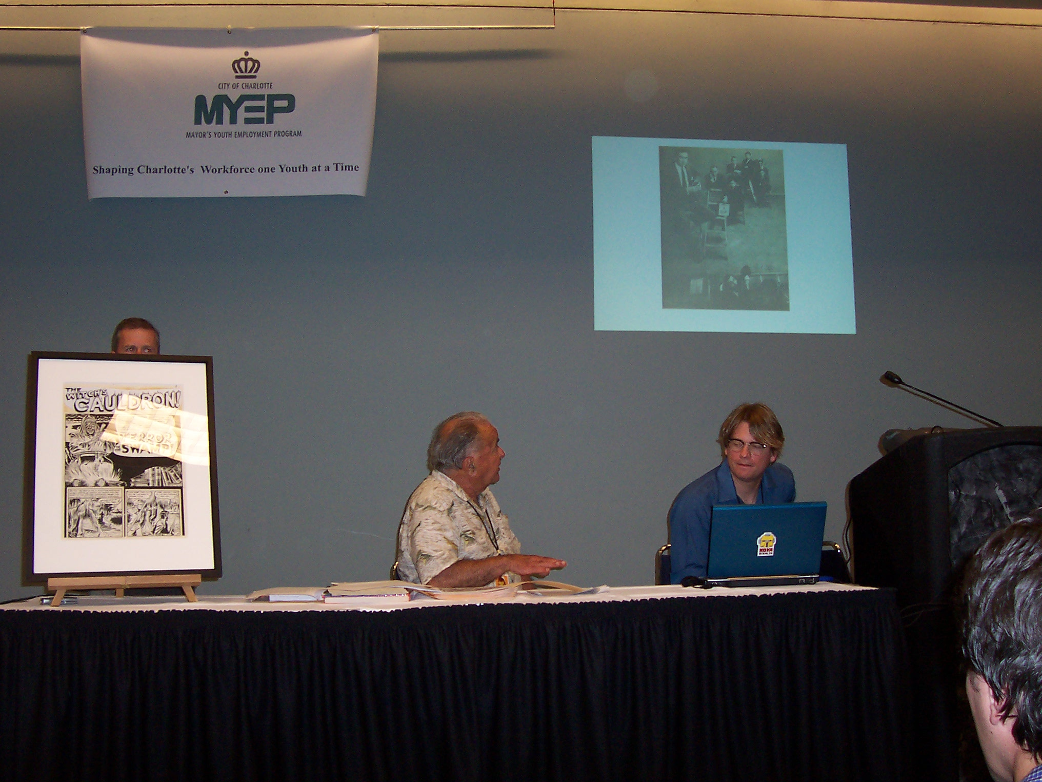 Craig Fischer, Al Feldstein and Ben Towle at Heroes Con 2008.